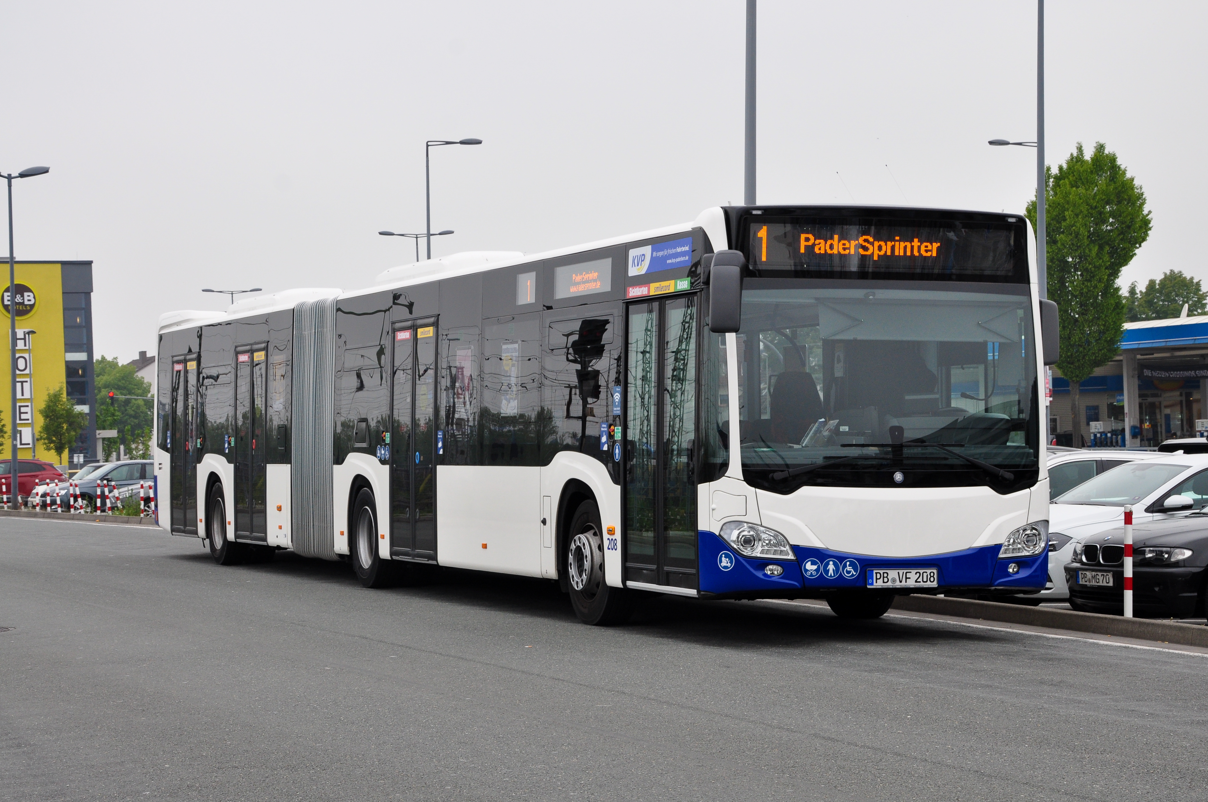 Hier sieht man einen der neuen PaderSprinter (KVP-Kraftverkehrs Gesellschaft Paderborn mbH) Citaro 2 Gelenkbusse.